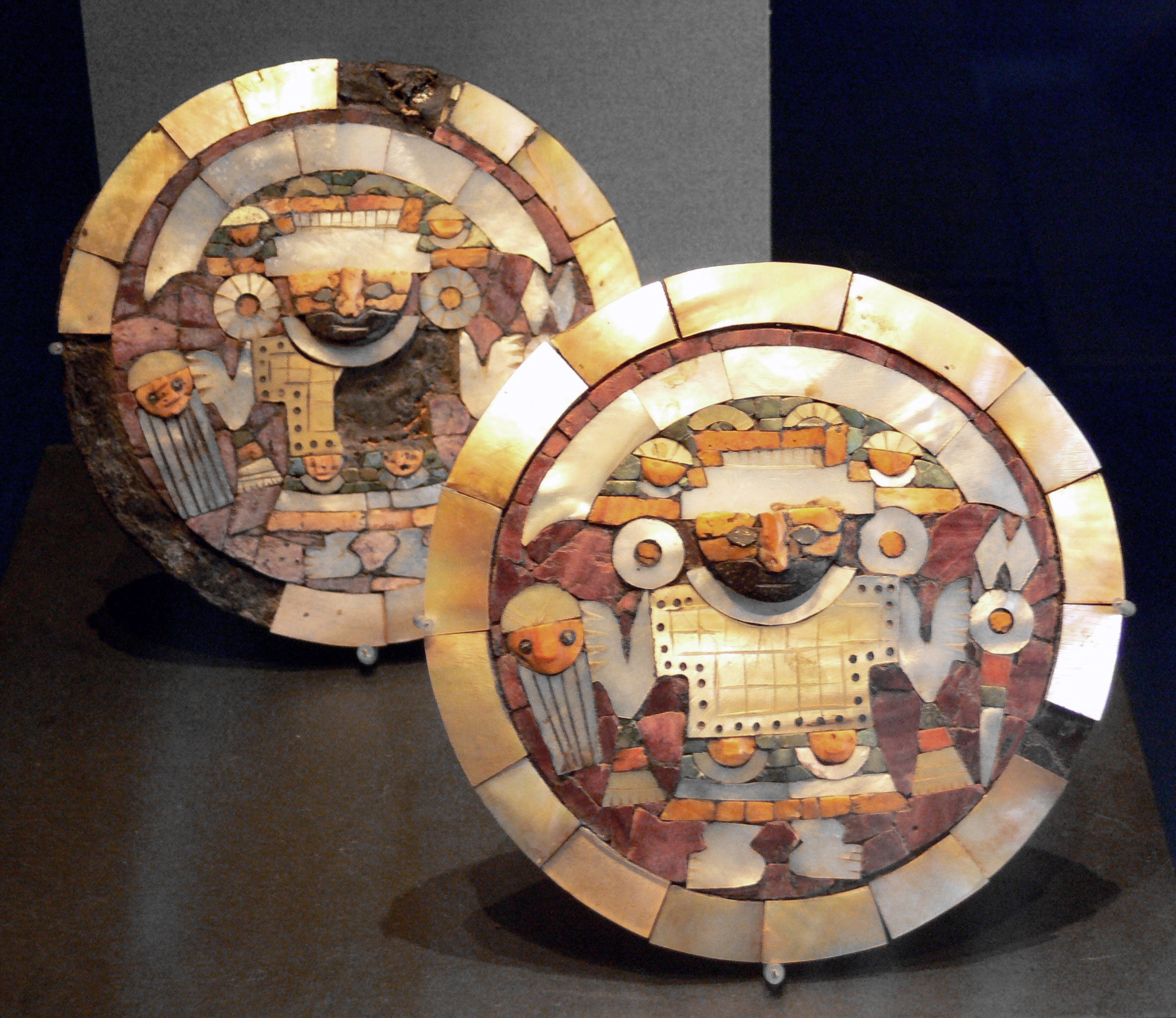 Schaffhausen, Museum zu Allerheiligen, Sammlung Ebnöther (Abteilung „Schmuck“) Muschel-Ohrpflöcke, Perlmutt-, Türkis- und Muschelmosaik auf Holz, Durchmesser je 11 cm, Peru, nördliche Küstenregion Tiahuanaco/Huari, 800–1200 n. Chr.